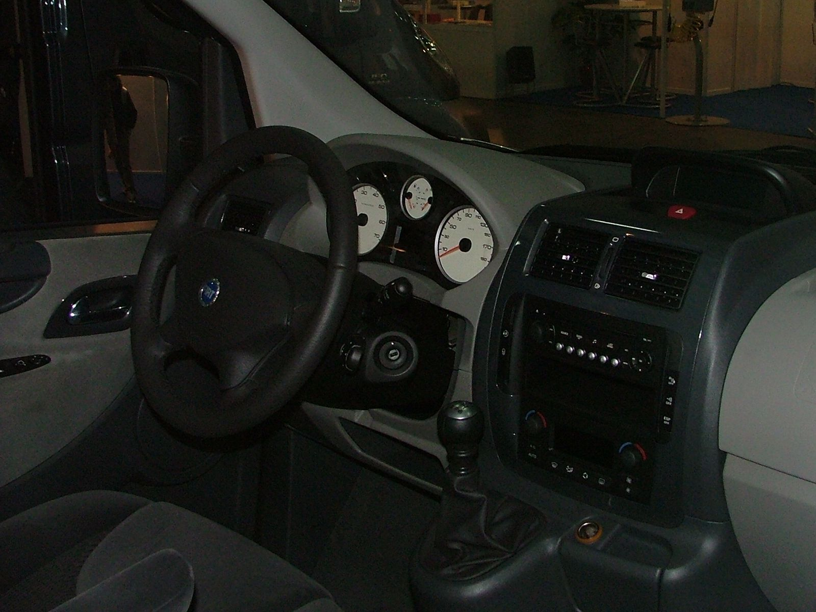 Polska, Kielce, V Międzynarodowe Targi Lokalnego Transportu Zbiorowego TRANSEXPO, 19-21 IX 2007